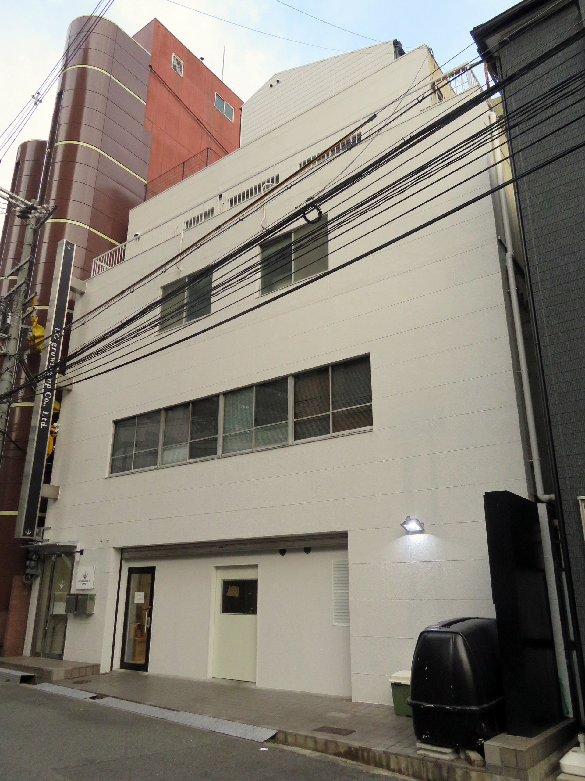 UGビルを撮影。